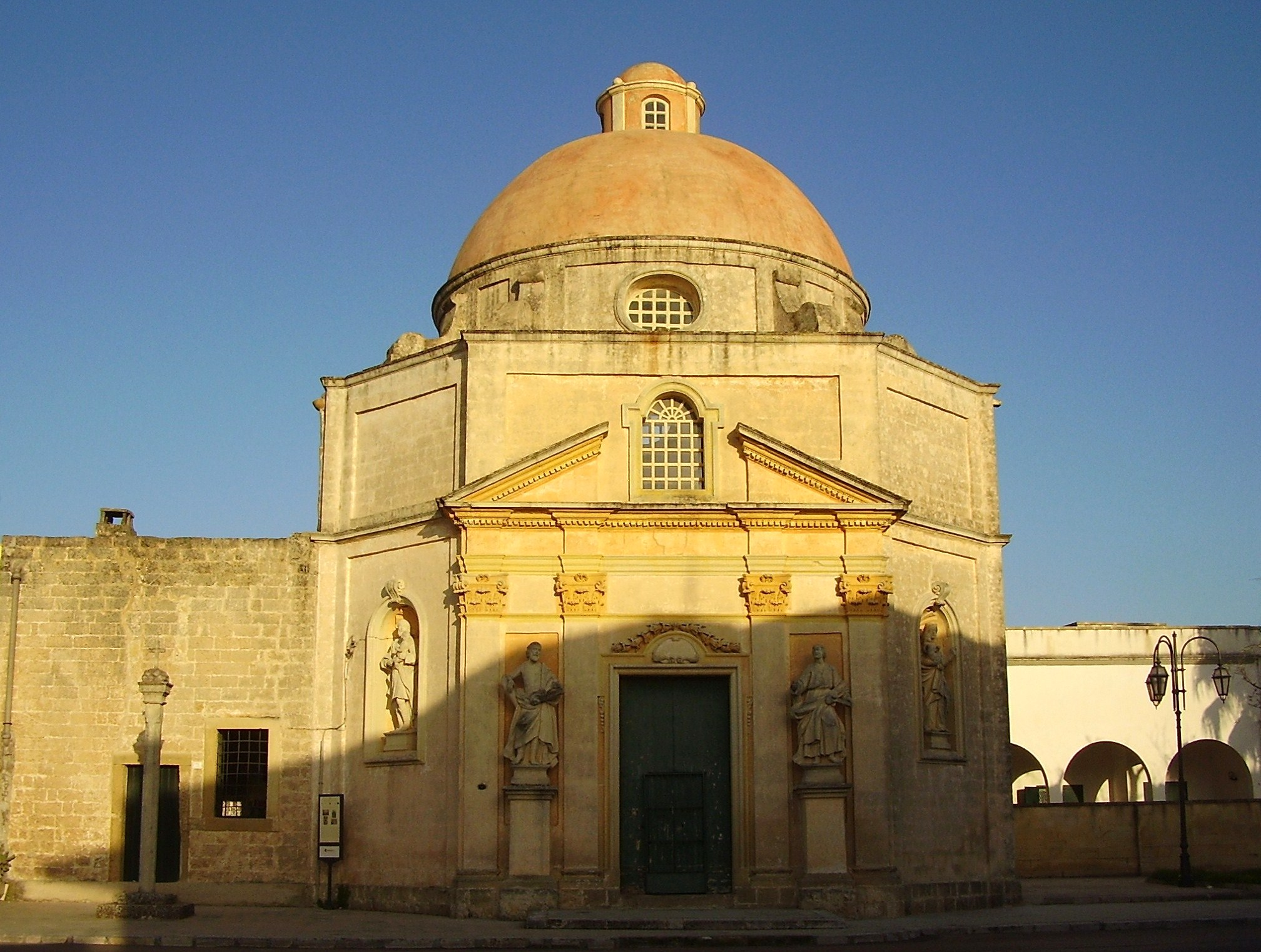 Chiesa Madonna della Luce Scorrano, Lecce